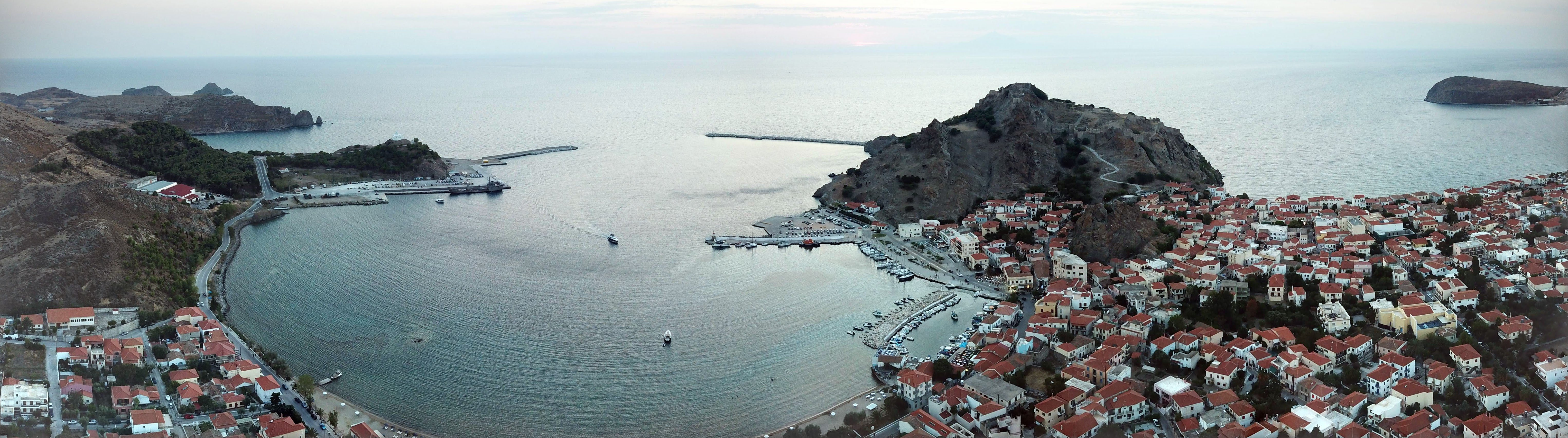 Κάστρο Μύρινας«Κάστρο Μύρινας»